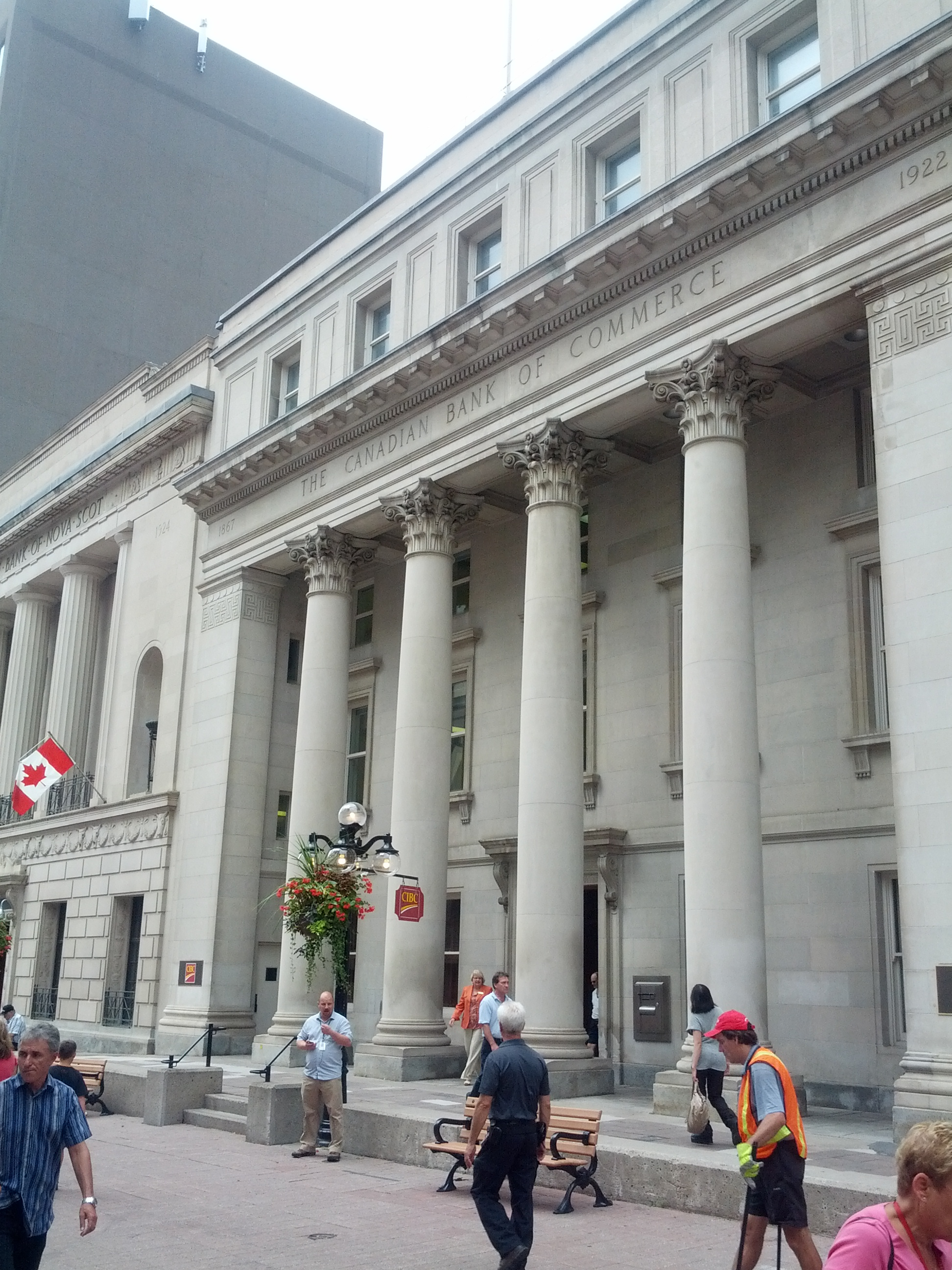 Edificação em Ottawa.